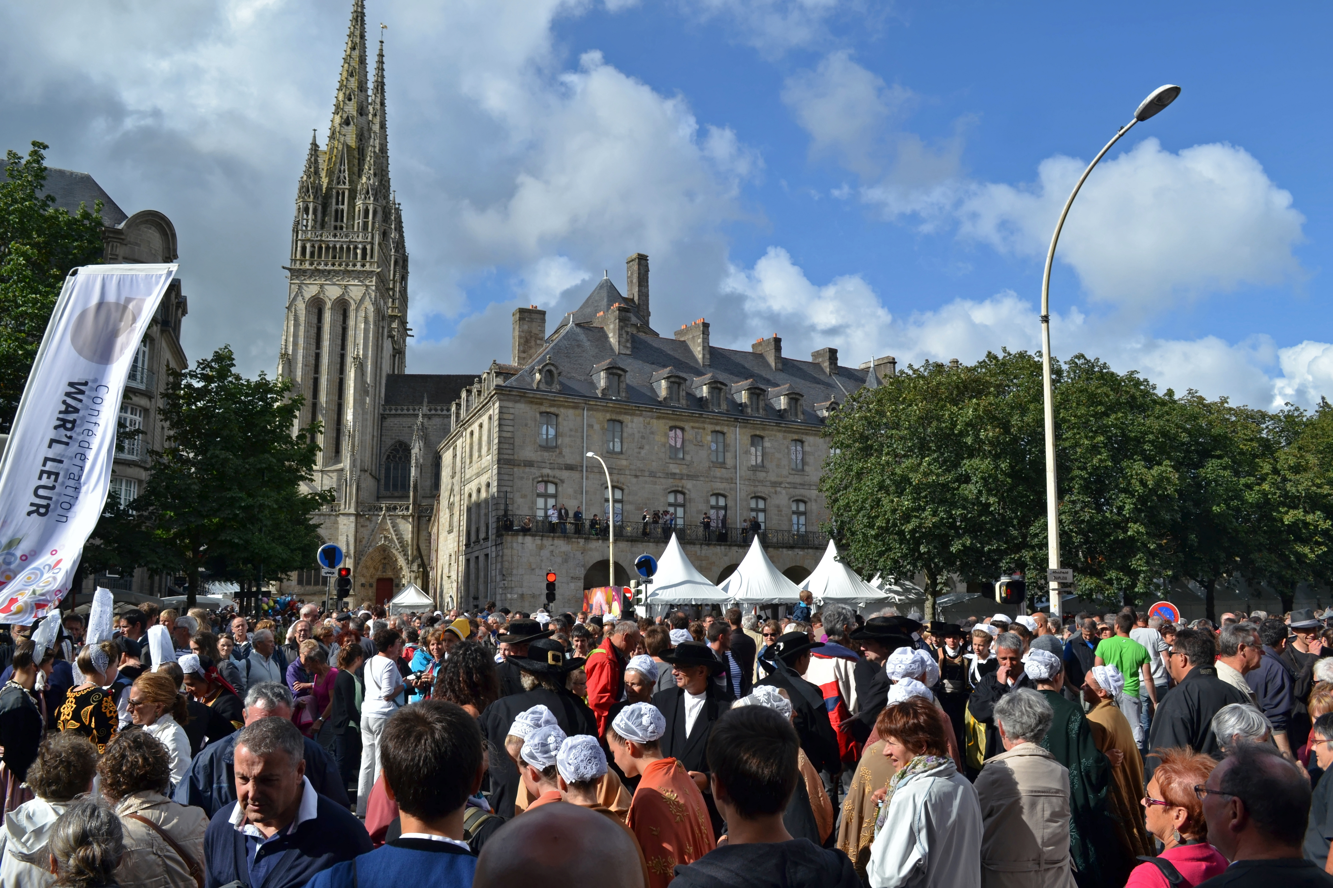 « Triomphe des sonneurs » lors du Kemper en Fête le dimanche 28 juillet 2013 en clôture du Festival de Cornouaille.